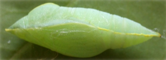 Catopsilia crocale chrysalis